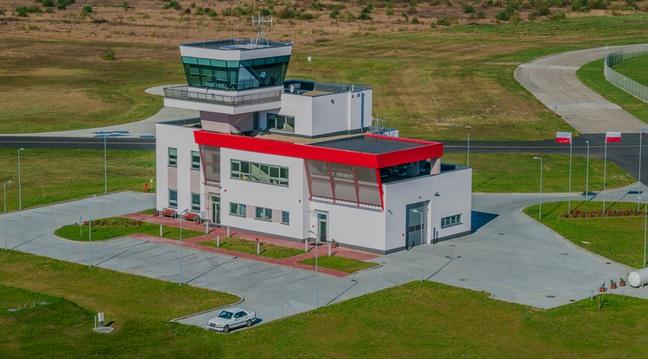 Siedziba lotniska z lotu ptaka